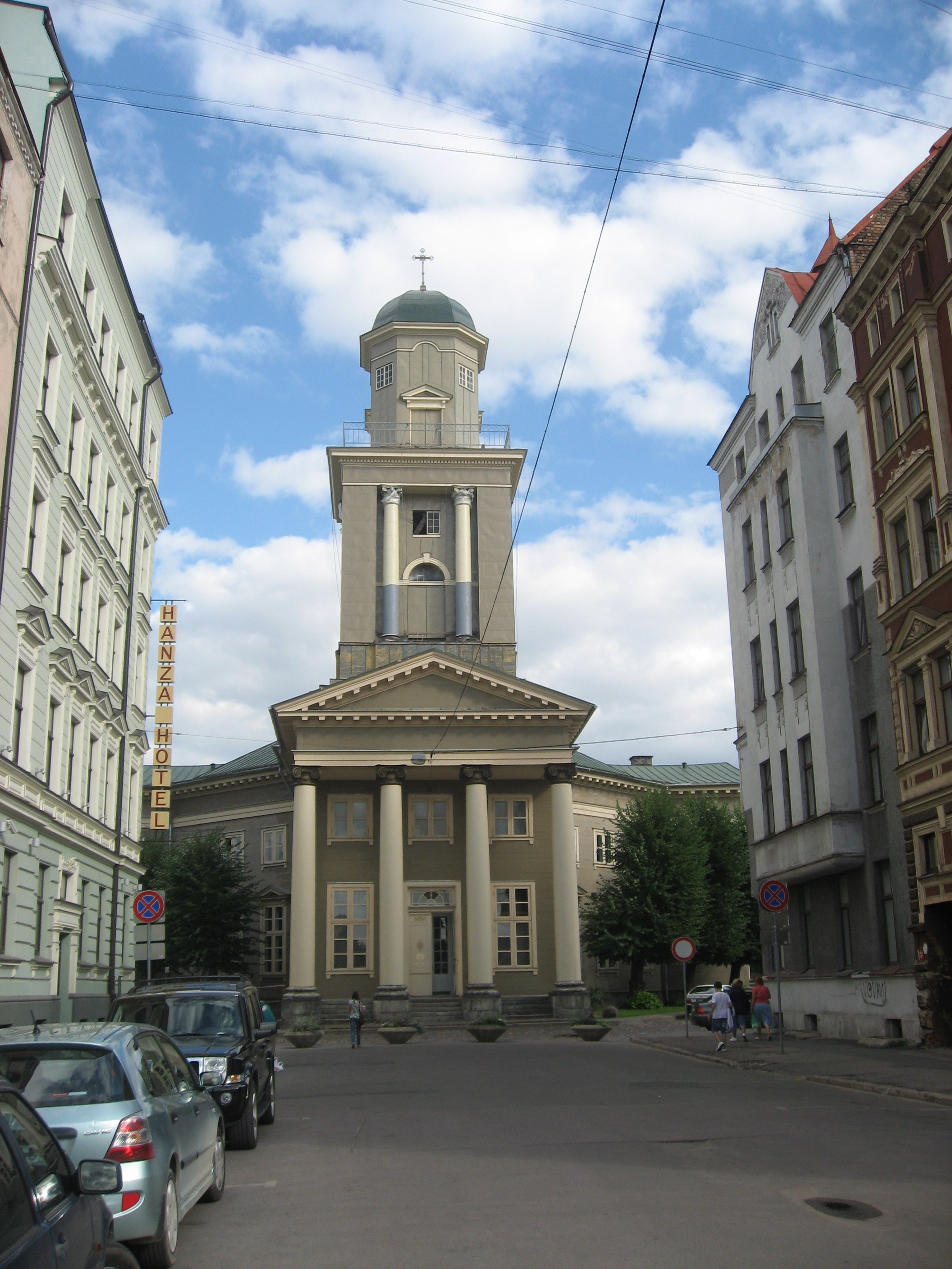 Rīgas Jēzus evanģēliski luteriskā baznīca